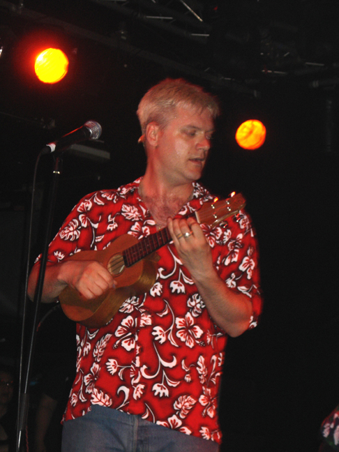 Spike Slawson playing ukulele